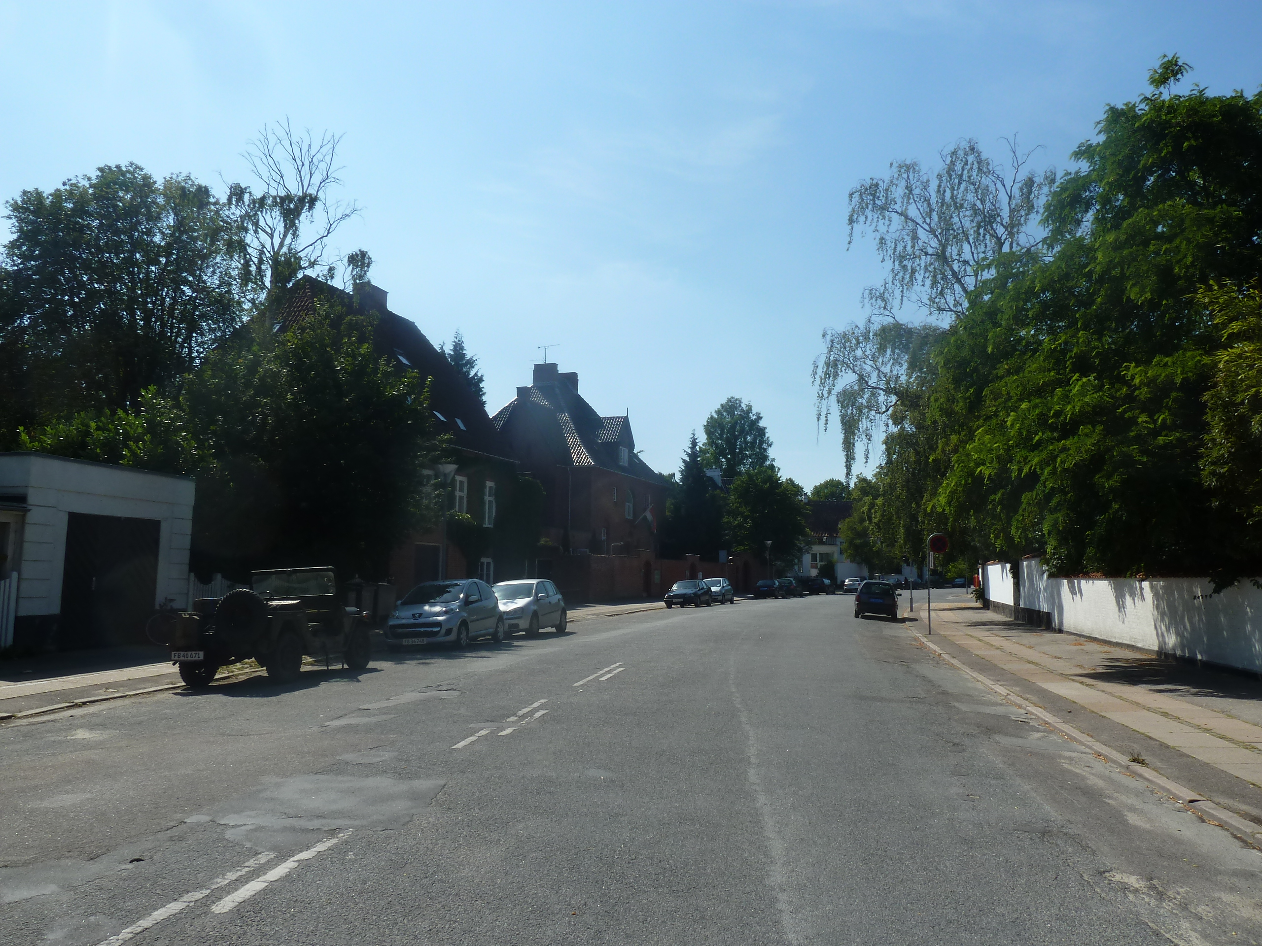 The street Vangehusvej in Østerbro in Copenhagen.